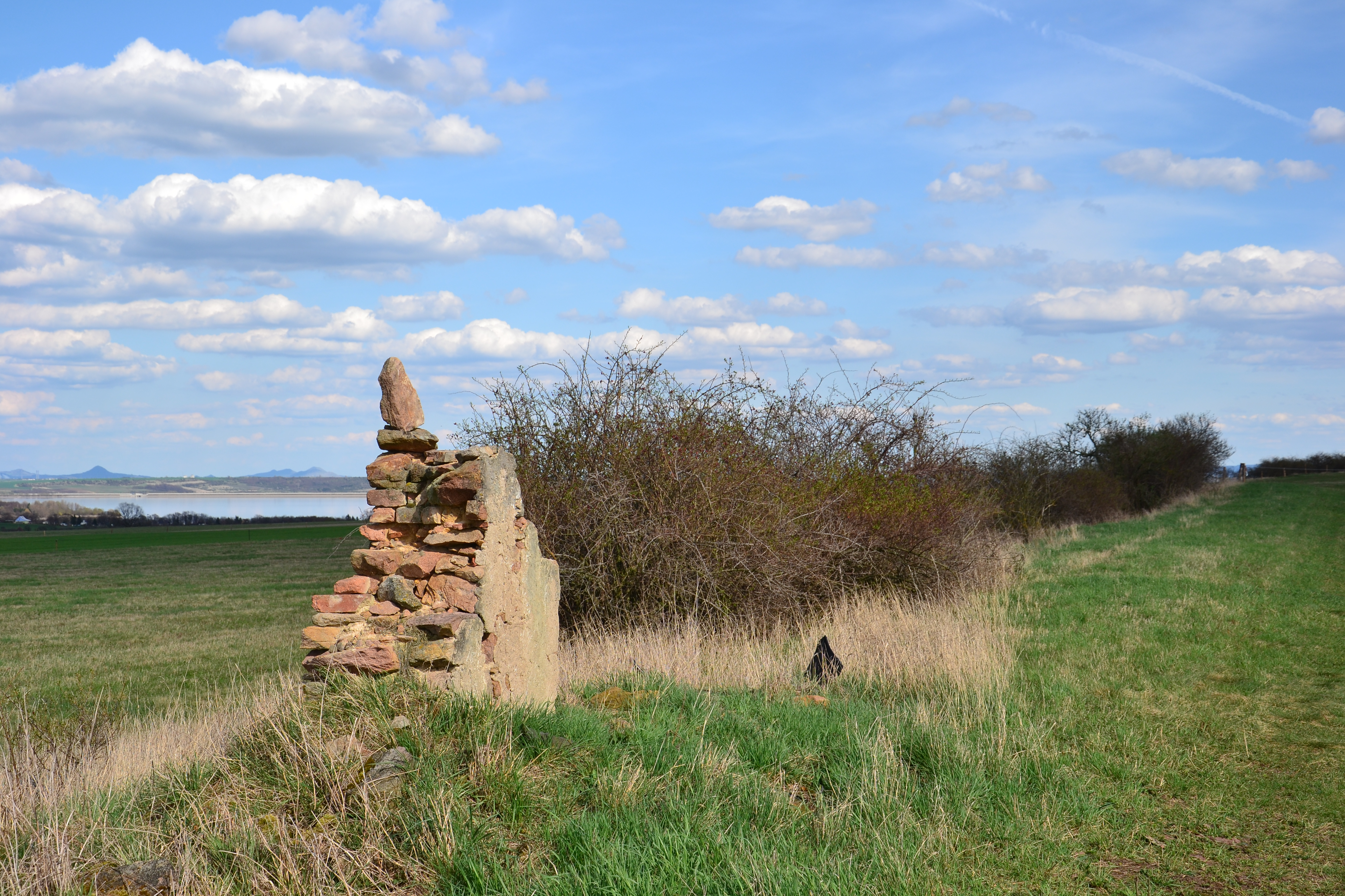 Nová Víska u Rokle – torzo kaple u polní cesty z Hradce do Hořenic